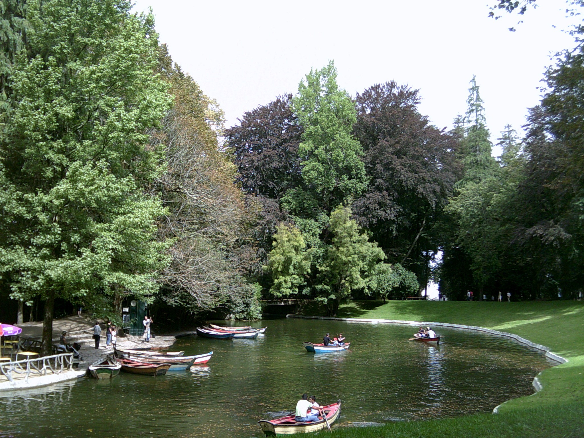 Santuário do Bom Jesus do Monte, freguesia de Tenões, concelho e distrito de Braga, Portugal: aspecto do grande lago no parque natural. Este lago foi criado por António Brandão Pereira, em 1842.